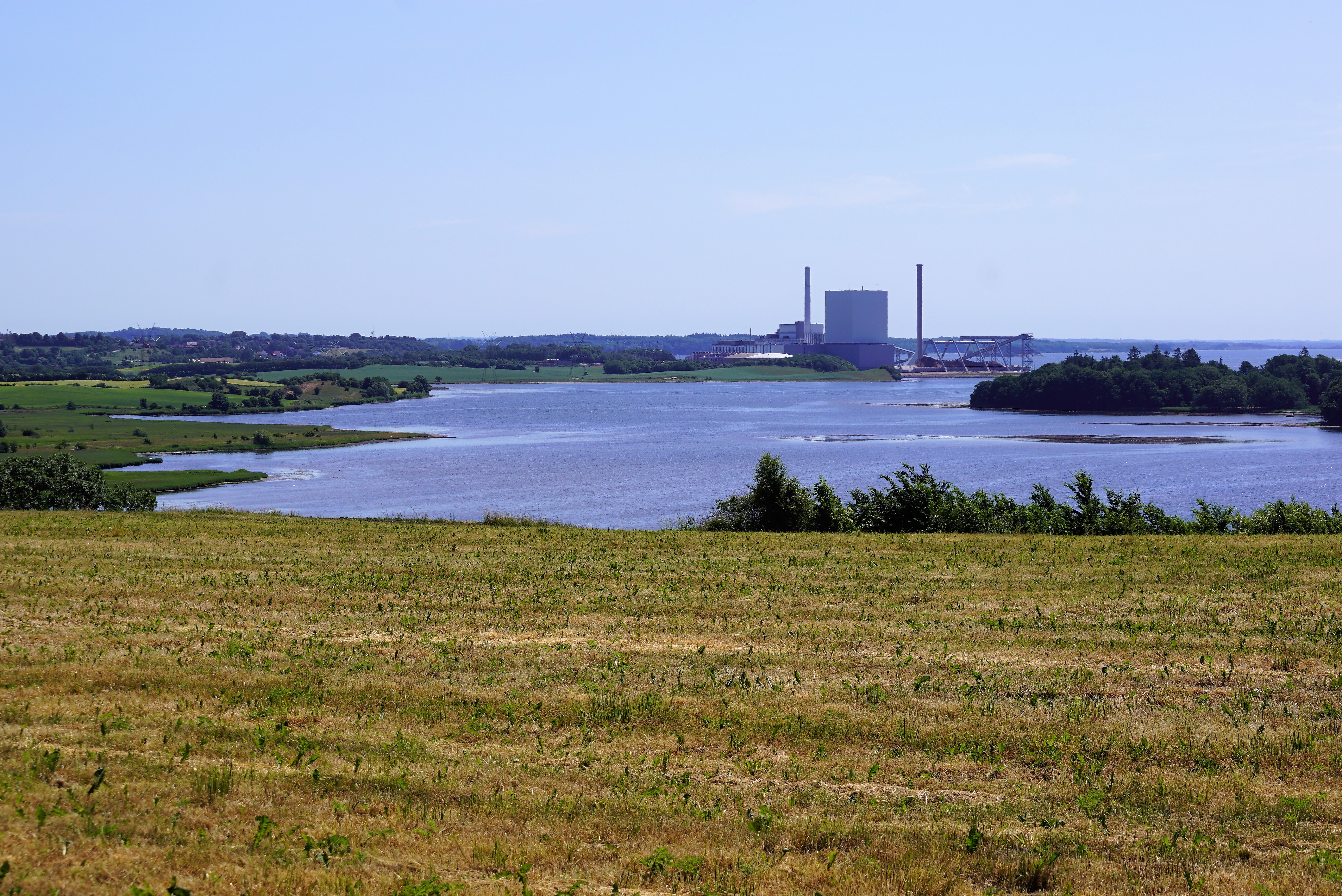 Gudsø Vig set mod øst fra landevejen (161). Skærbækværket i baggrunden